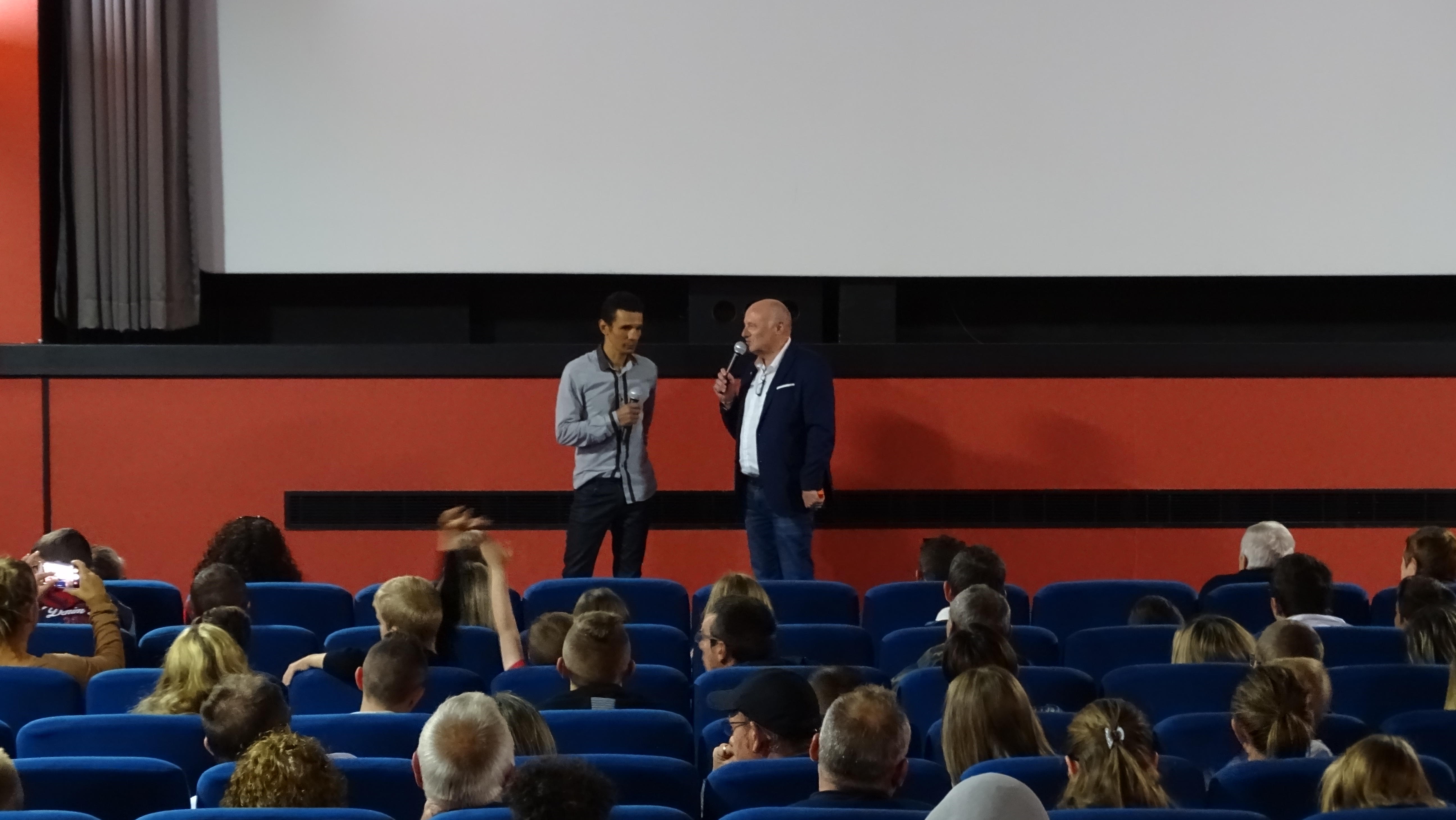 Karim Chakim à L'idéal Cinéma - Jacques Tati d'Aniche le 29/09/2018 pour le documentaire, dont il est le personnage principal "Il respire encore" (Still Breathing), d'Anca Hirte tourné en 2012.